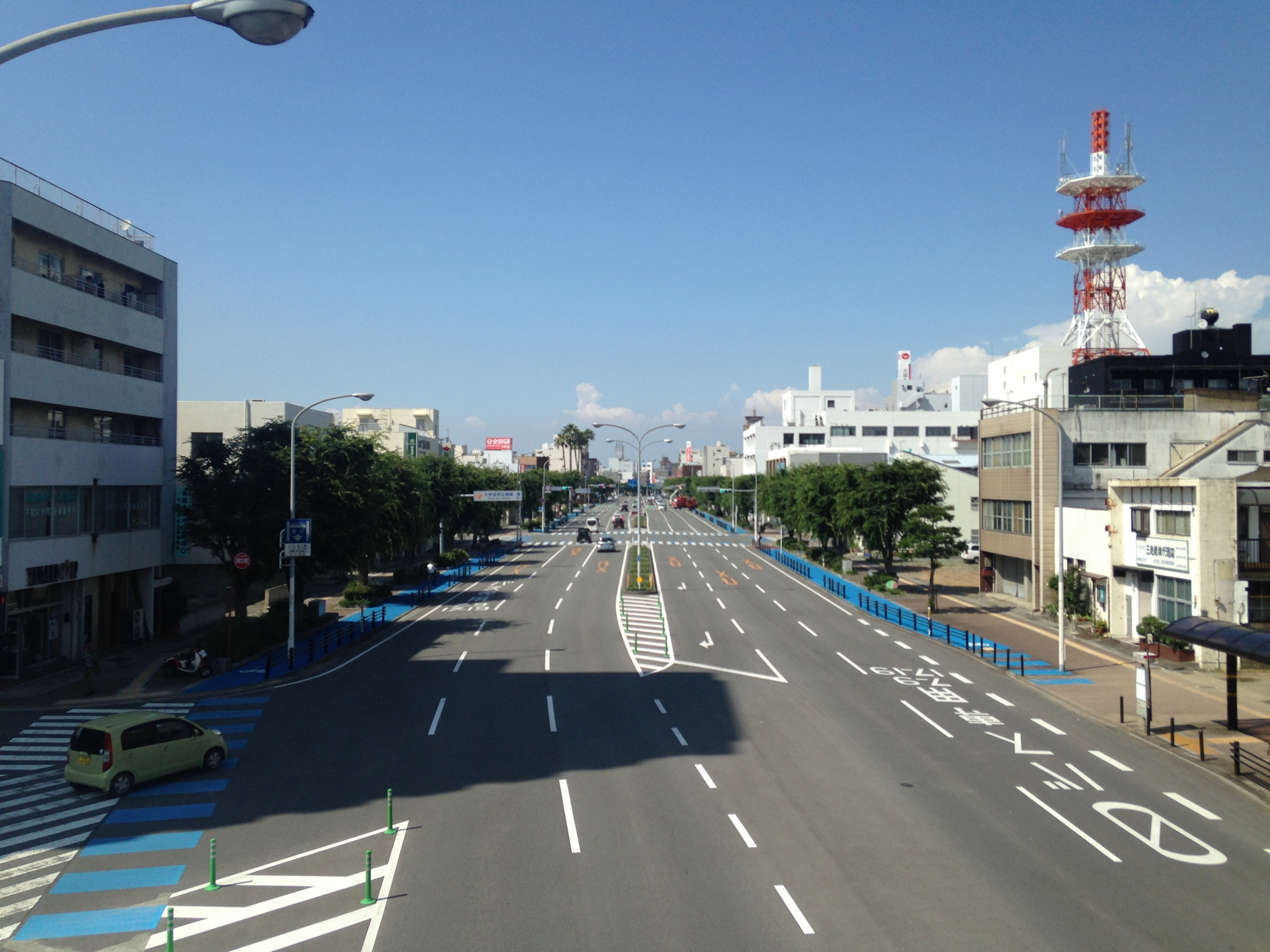 不知火町歩道橋より望む国道208号(大牟田駅方面)